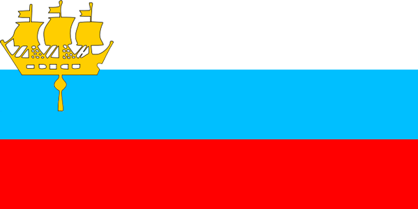 Проект флага Ленинграда (Санкт-Петербурга) (один из вариантов), 1991